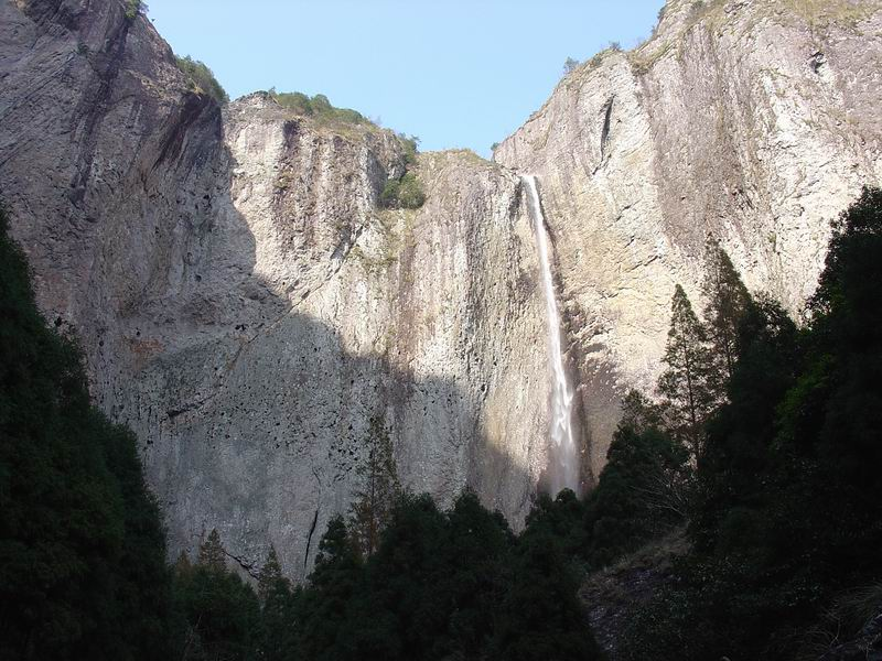 大龙湫